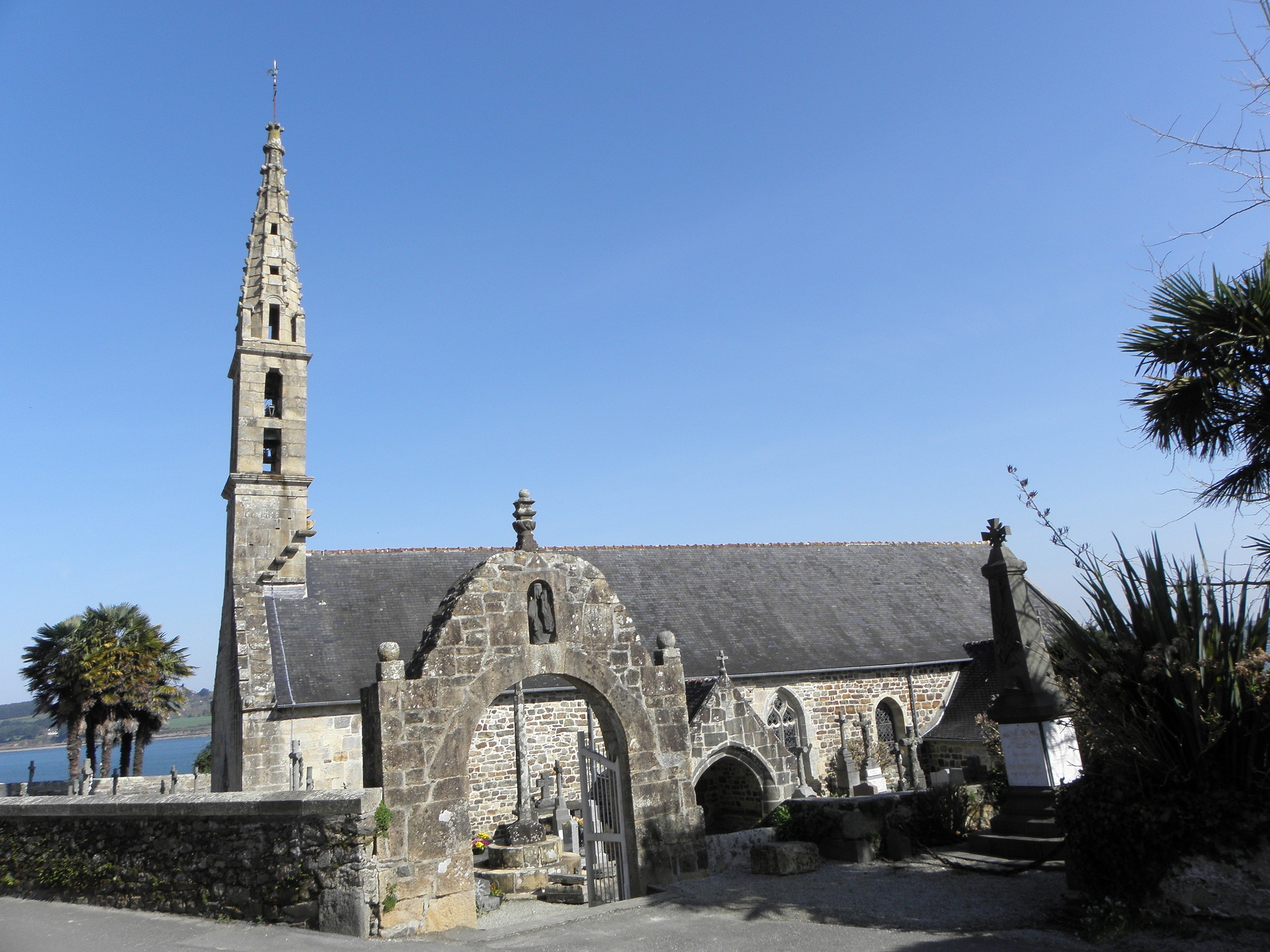 Vue méridionale de l'église Notre-Dame de Landévennec (29). .